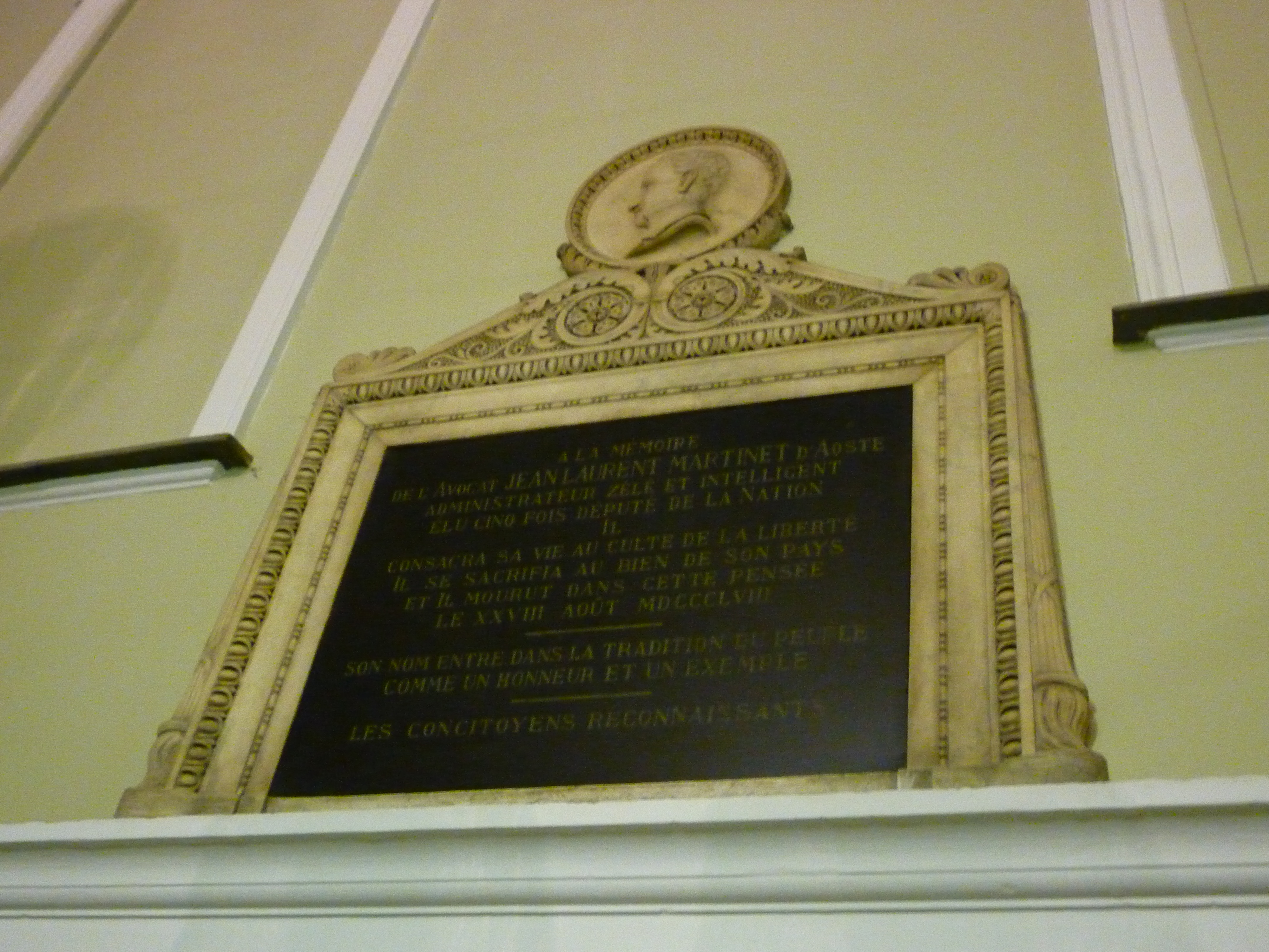 Plaque dédiée à Jean-Laurent Martinet à l'Hôtel-de-Ville à Aoste